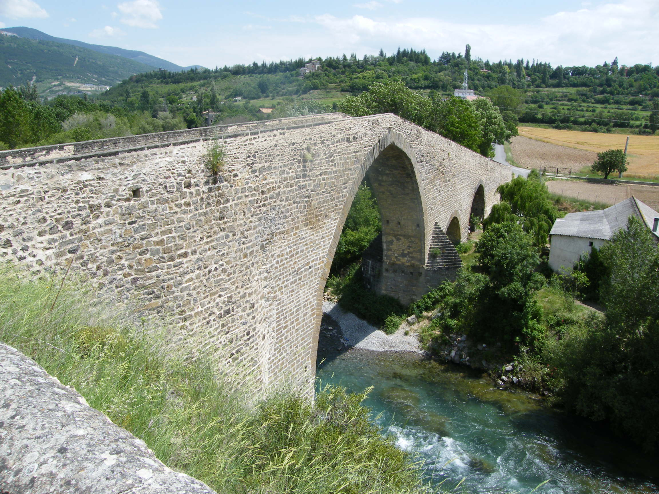 Jaca (province de Huesca, Espagne) - Pont San Miguel au dessus du río Aragon.